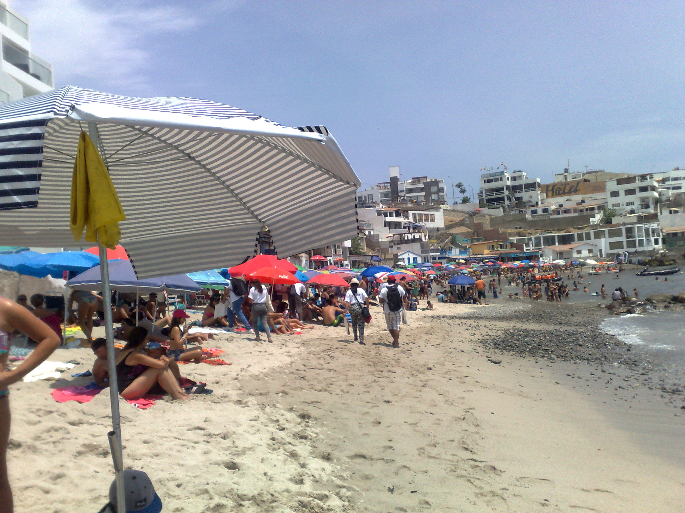 Lateral en Playa